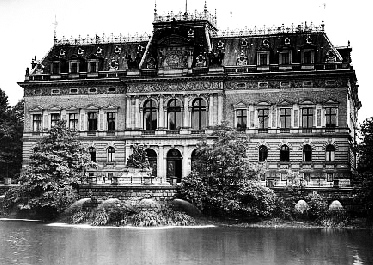 Provinzial Ständehaus in Düsseldorf, erbaut von Julius C. Raschdorff von 1876 bis 1880, Abbildung.jpg